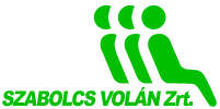 Szabolcs Volán logo